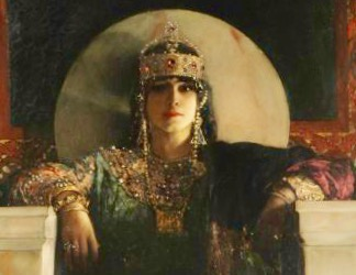 image dérivée de